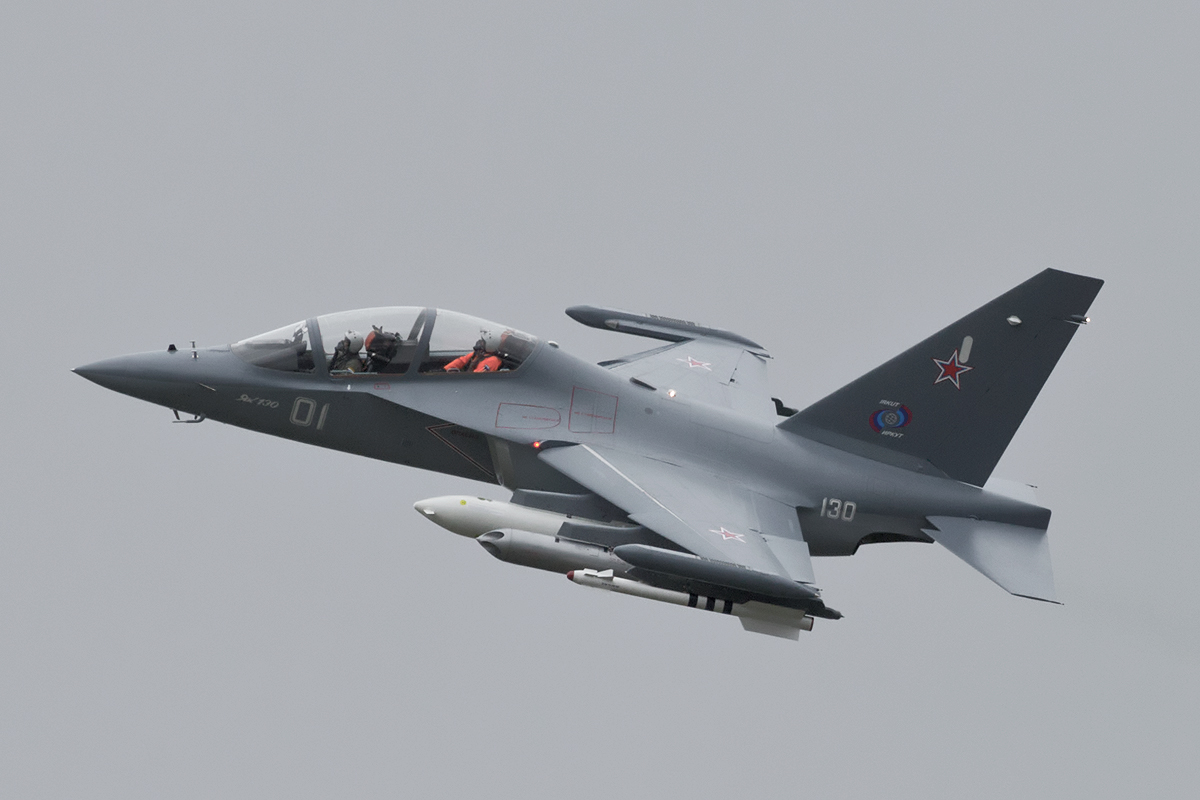 FIA 2012